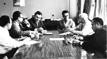 С академиком А.Н. Тихоновым (второй справа) в ВЦ Академии Наук Армении